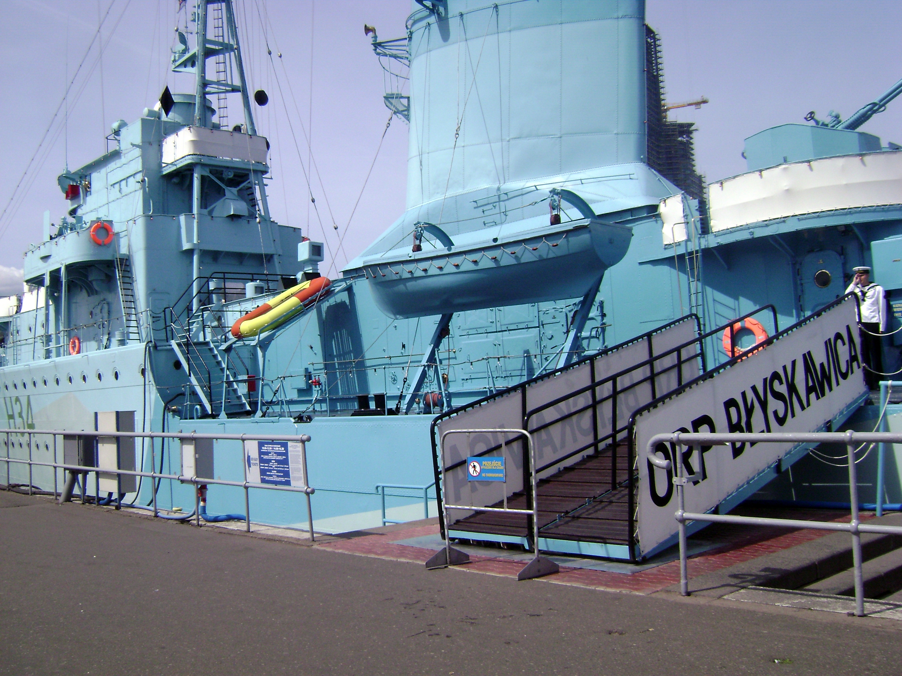 ORP Błyskawica jako okręt-muzeum w gdyńskim porcie